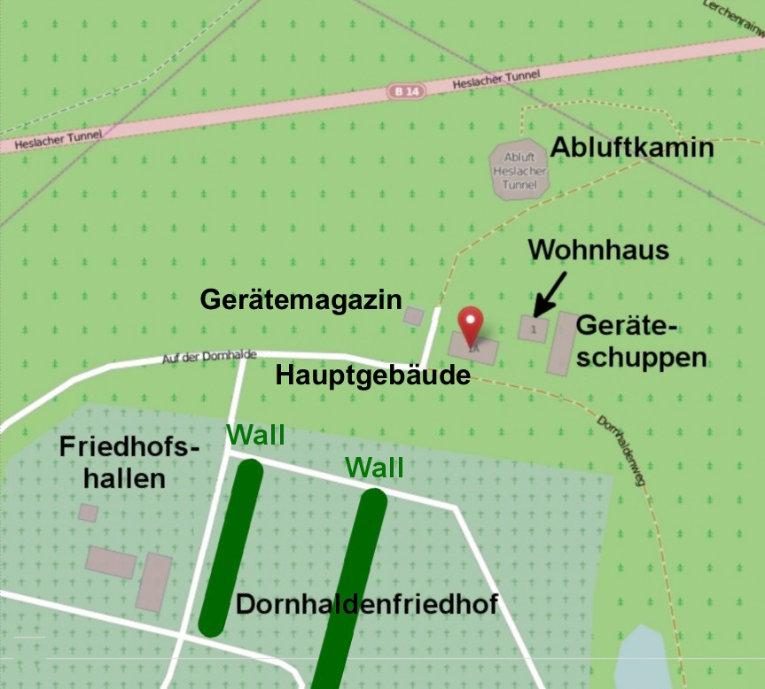 Lageplan des Garnisonsschützenhauses in Stuttgart-Degerloch.